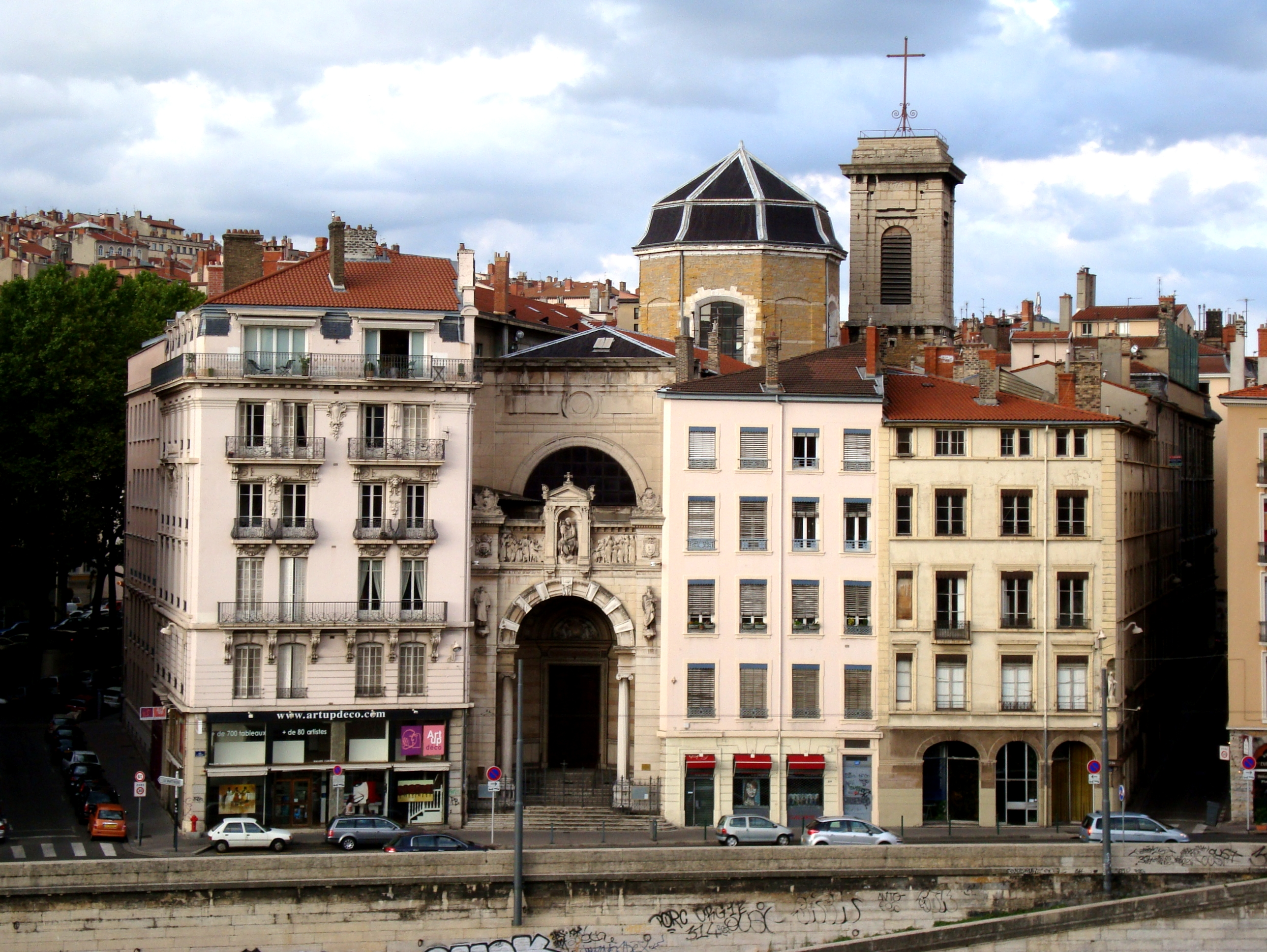 L'église Notre-Dame Saint-Vincent à Lyon (Rhône).